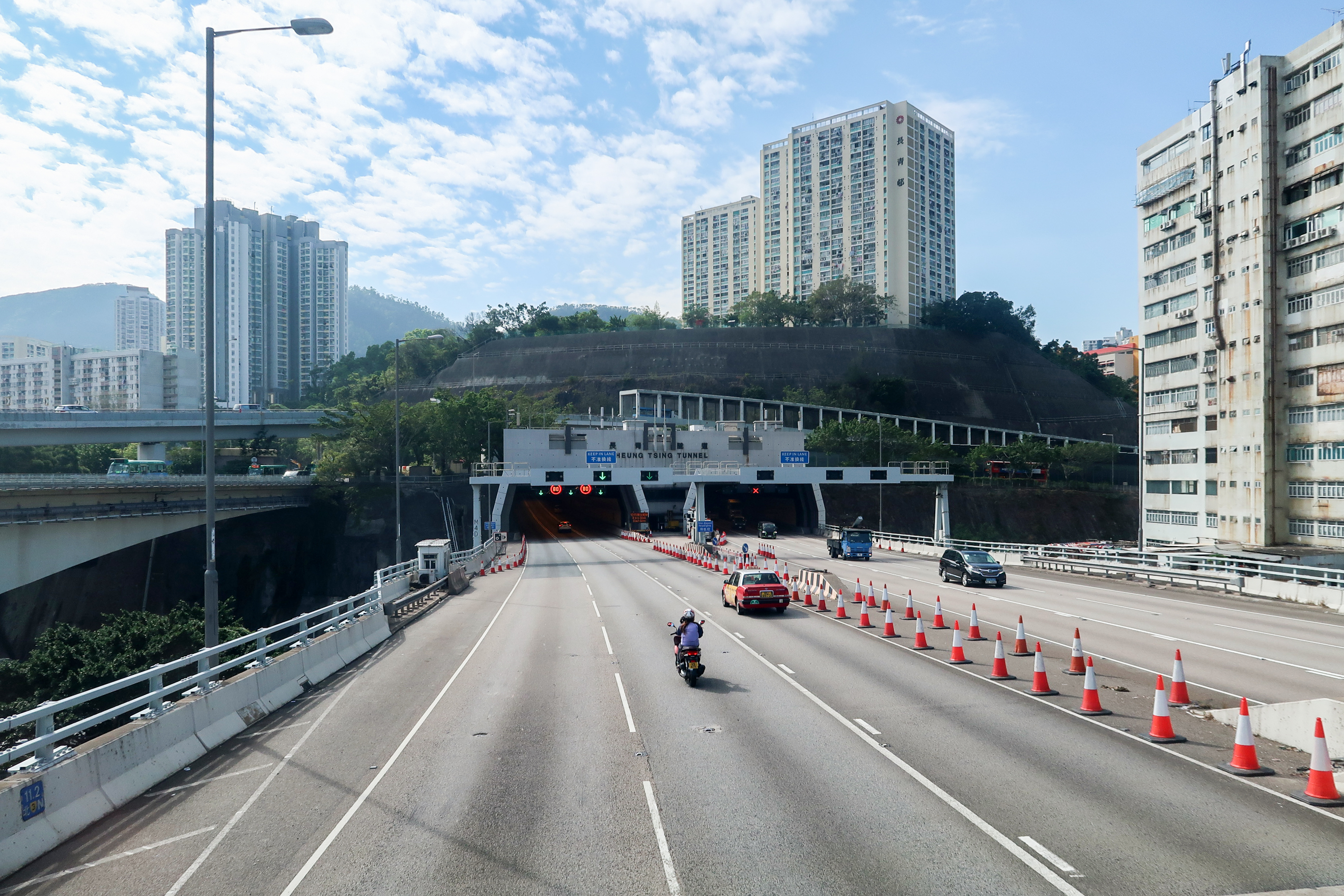 Cheung Tsing Tunnel